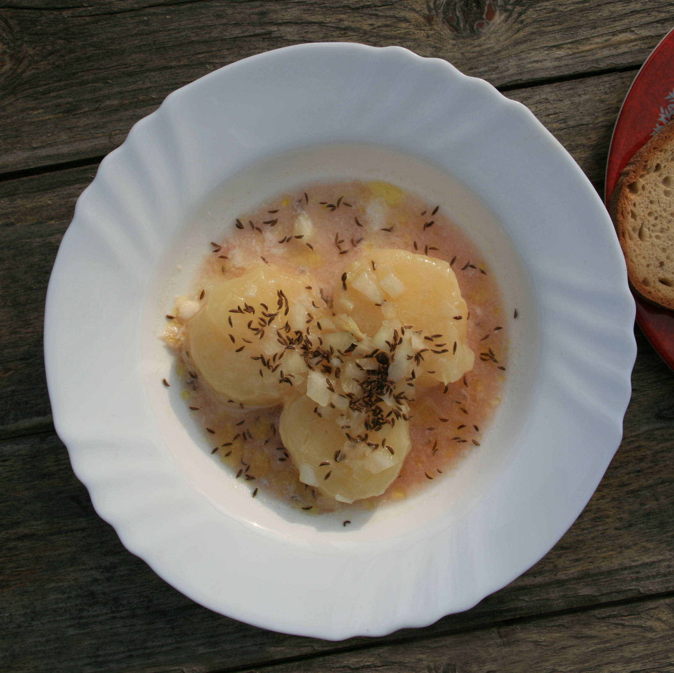 Mainzer Handkees mit Musik, aufgenommen bei der Rhoischnoog in Mainz Weisenau.